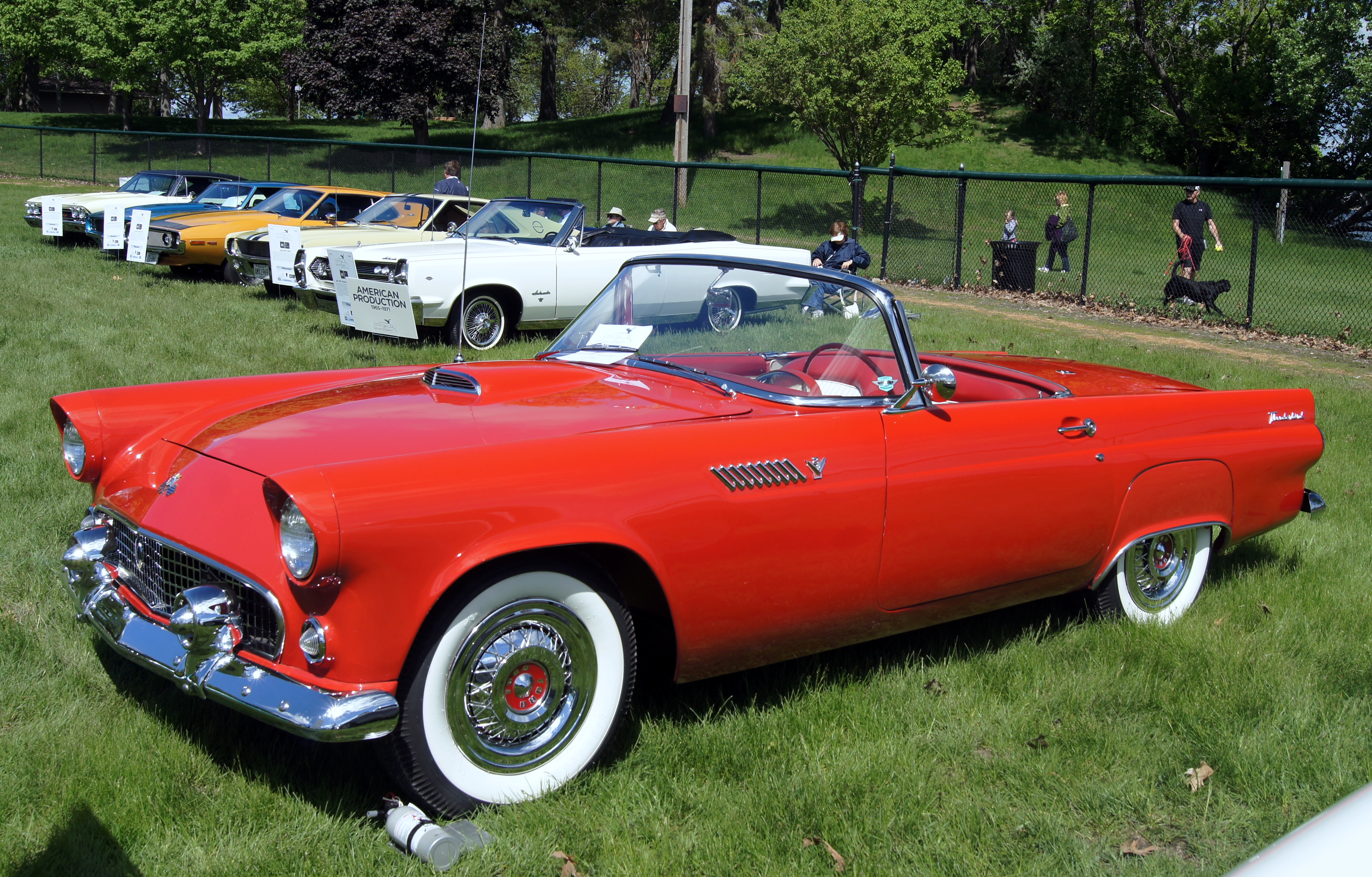 55 Ford Thunderbird